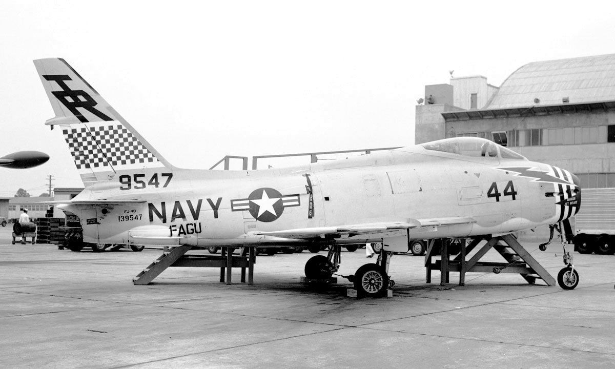 FJ-4Bsandiego57